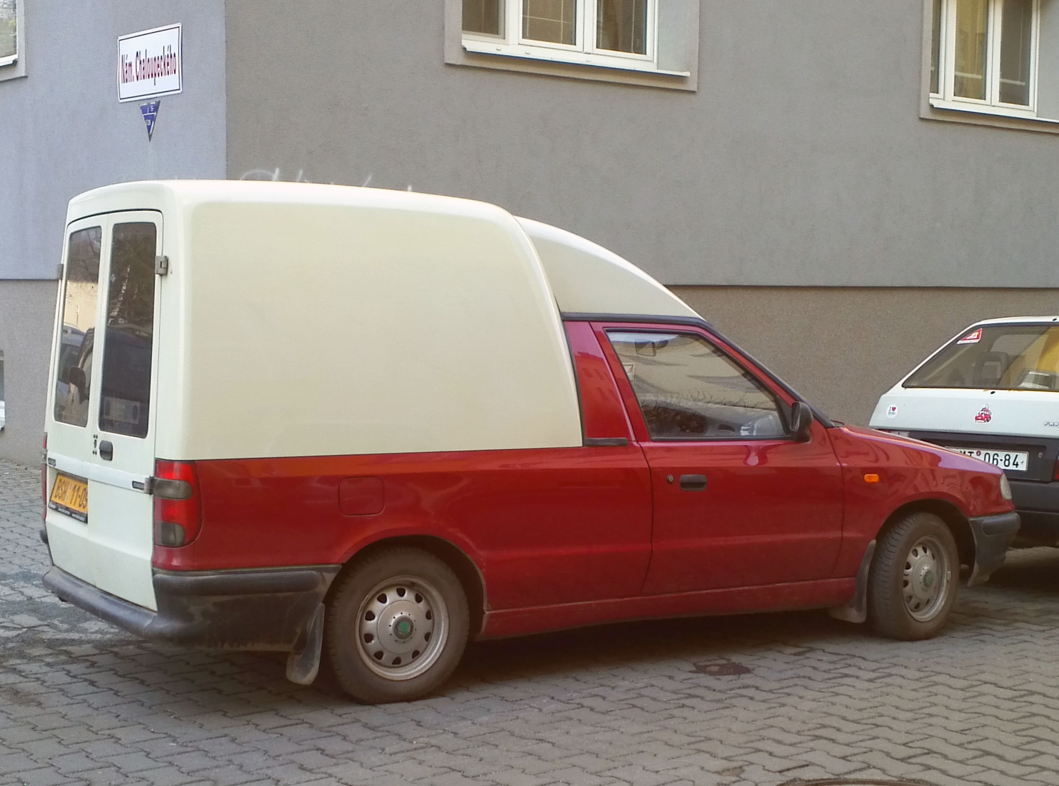 Škoda Felicia Pick-up, Brno, Chalupeckého náměstí.